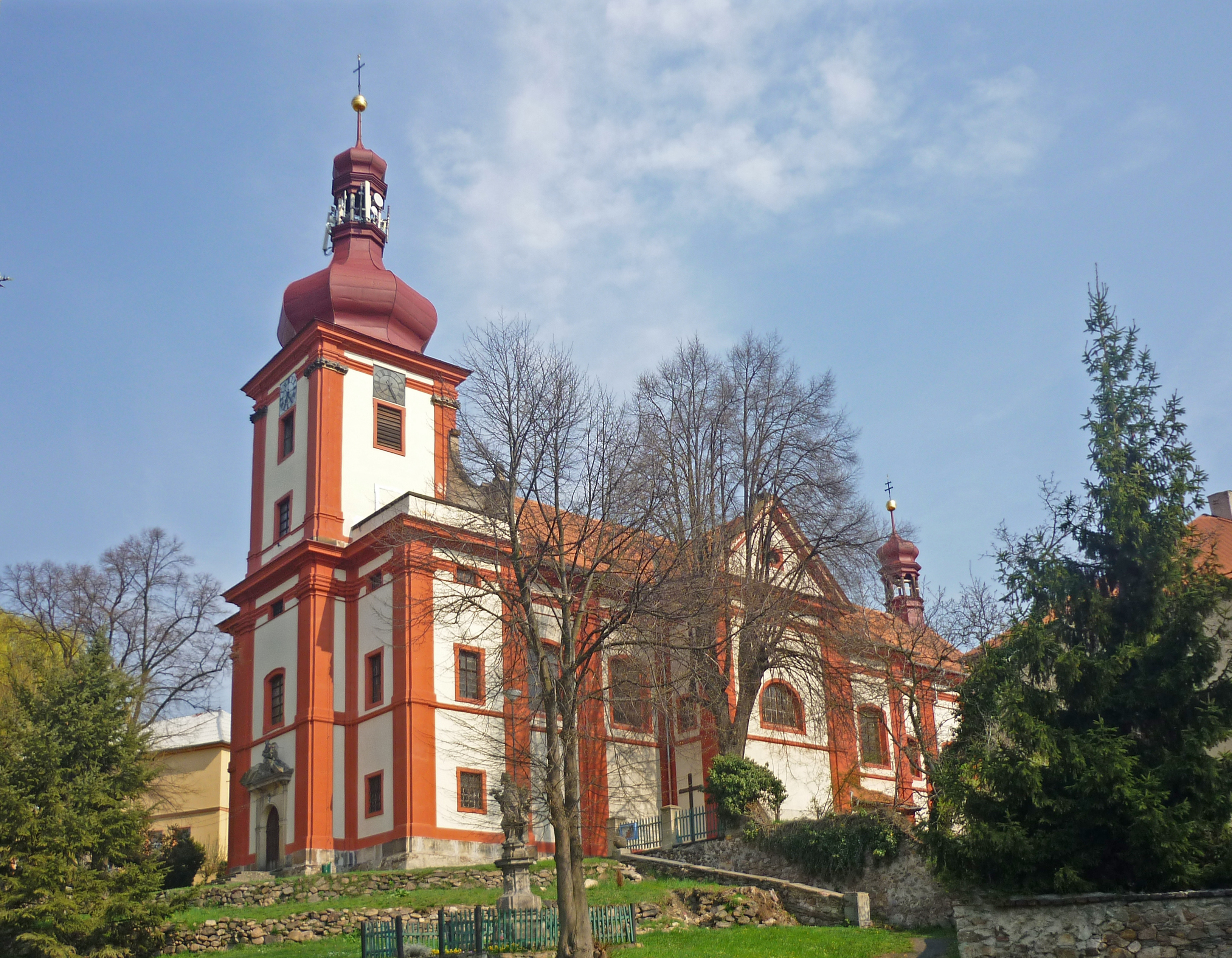 Kirche Mariä Himmelfahrt in Horní Jiřetín (Obergeorgenthal)